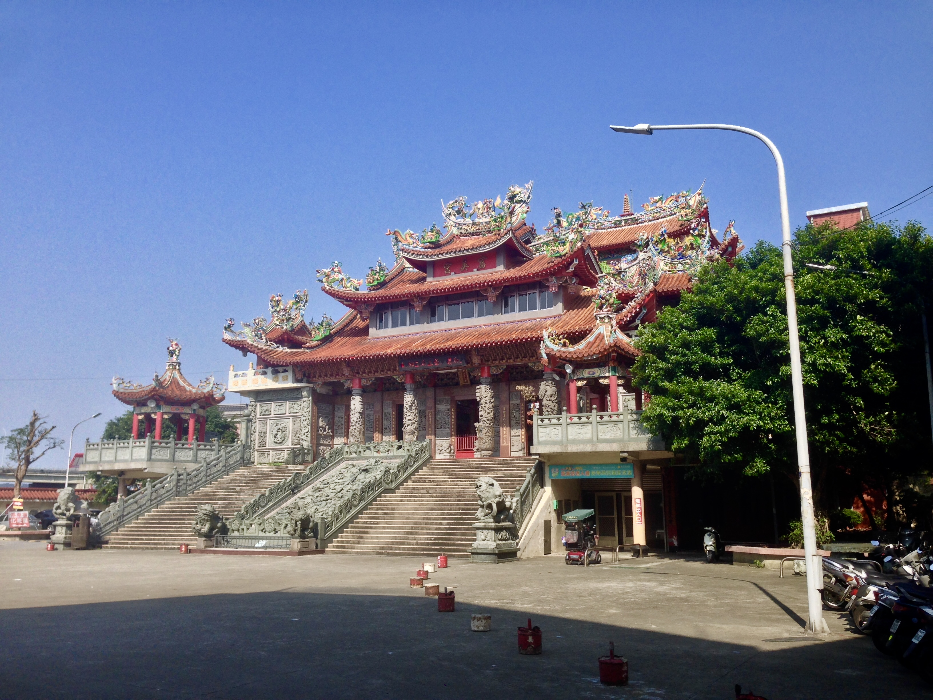 中文（台灣）: 南寮富美宮斜照